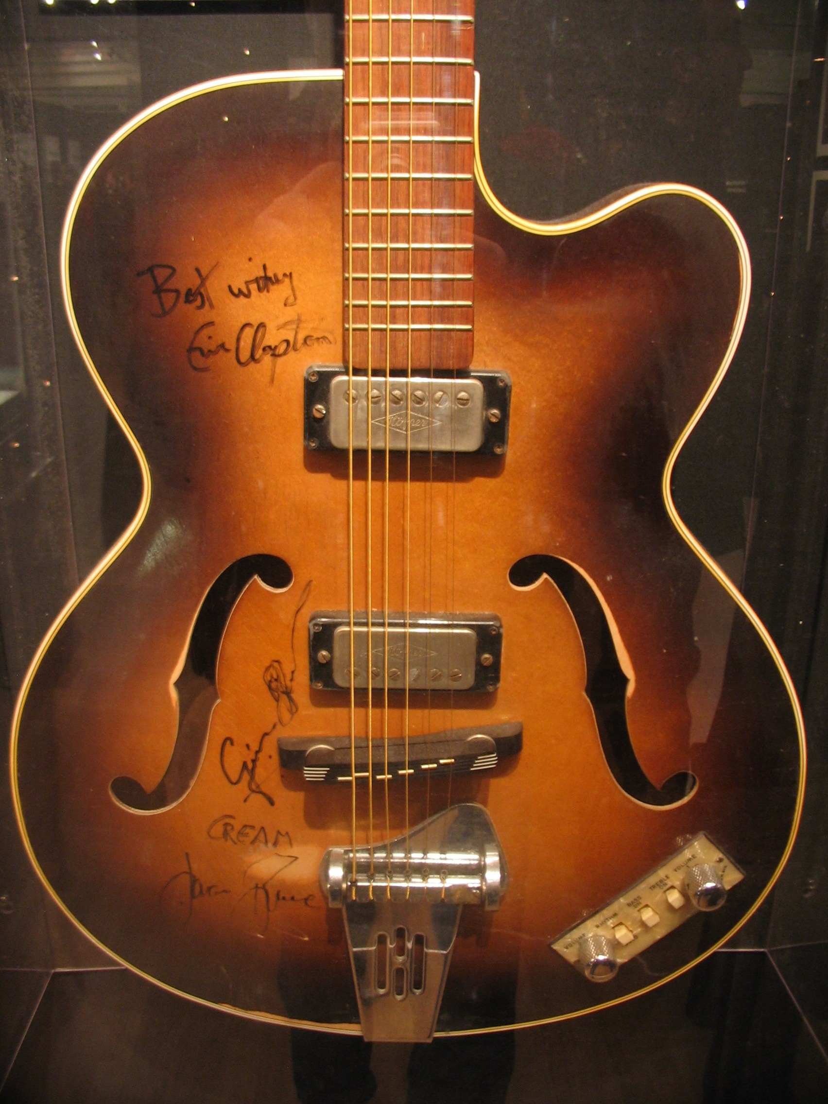 Cream guitar